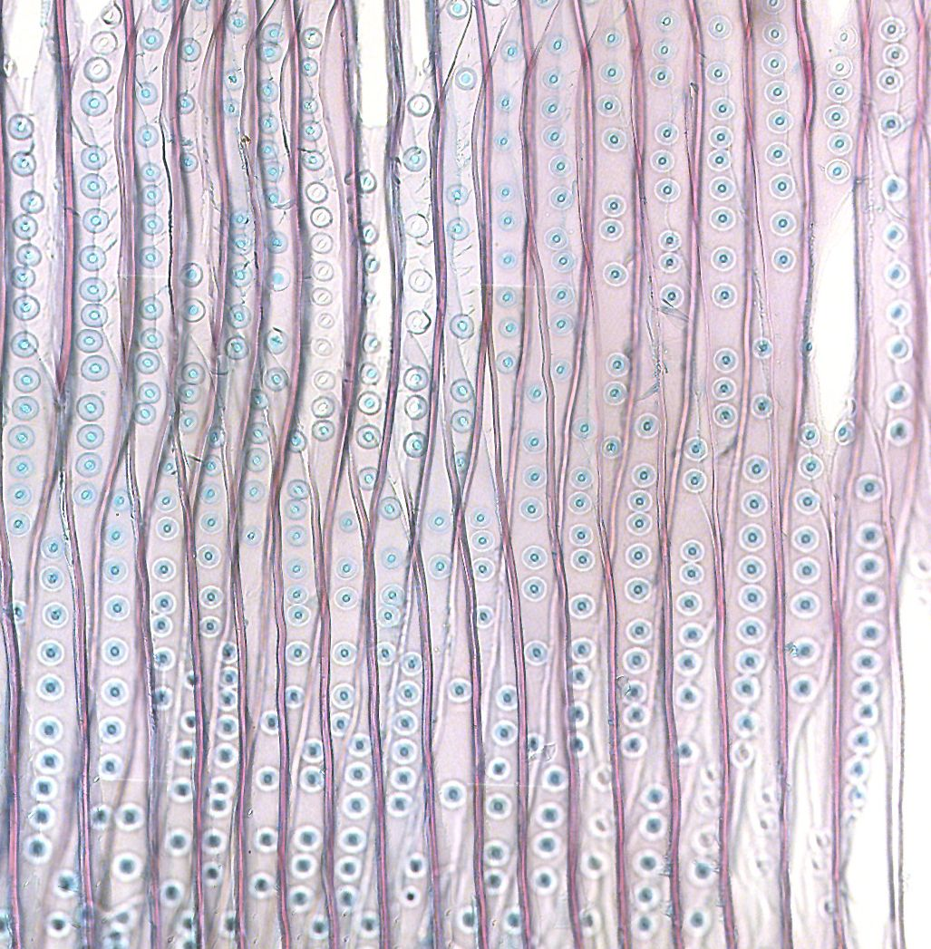 Abies concolor (Colorado-Tanne) aus Hortikultur (Schwaz, Tirol). Dünnschnitt tangential, nach Bleichen in NaOCl 5% und Färben in Fuchsin, Chrysoidin und Astrablau (Dreifachfärbung nach Etzold, 2002)